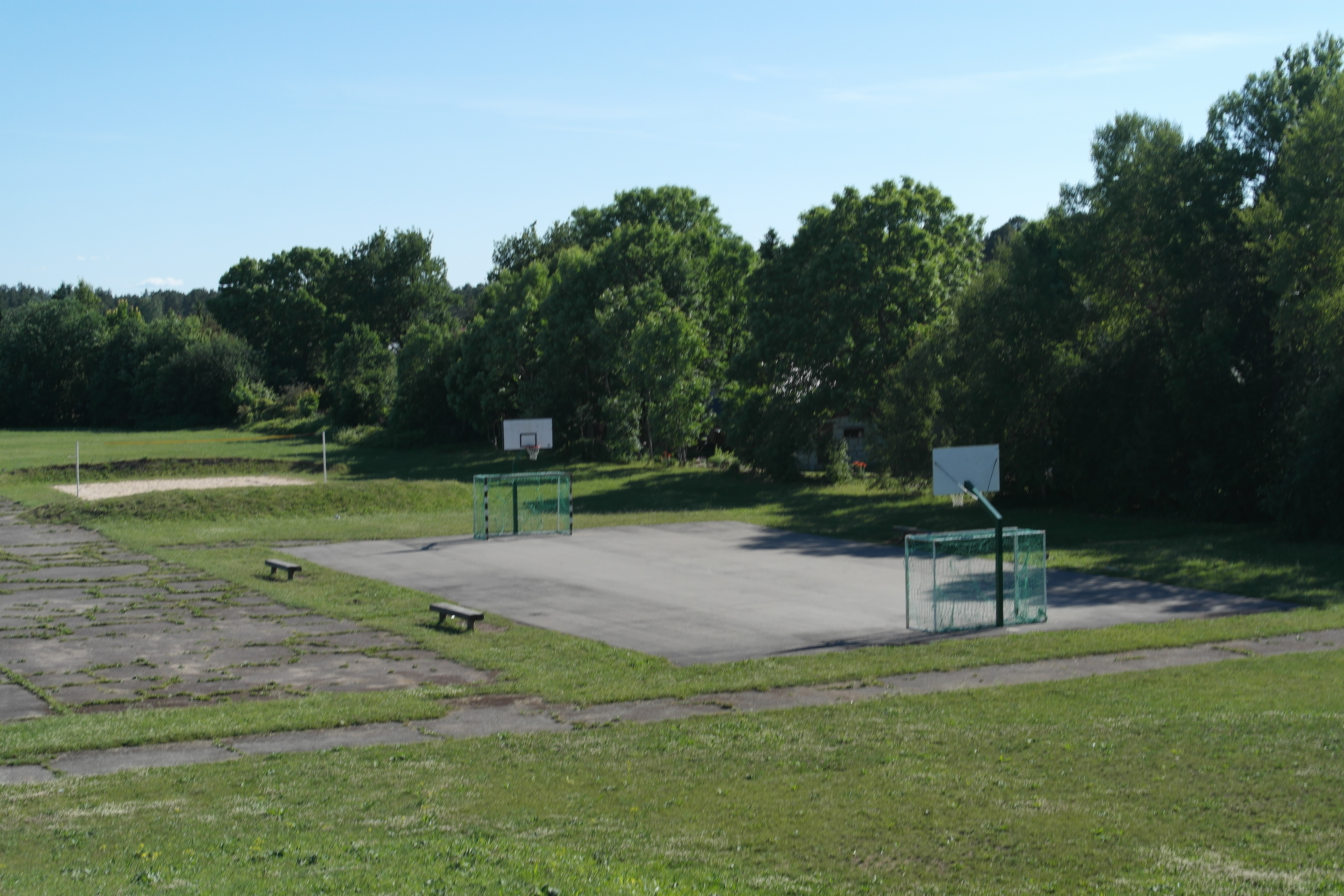 Aruküla aleviku korvpalliväljak